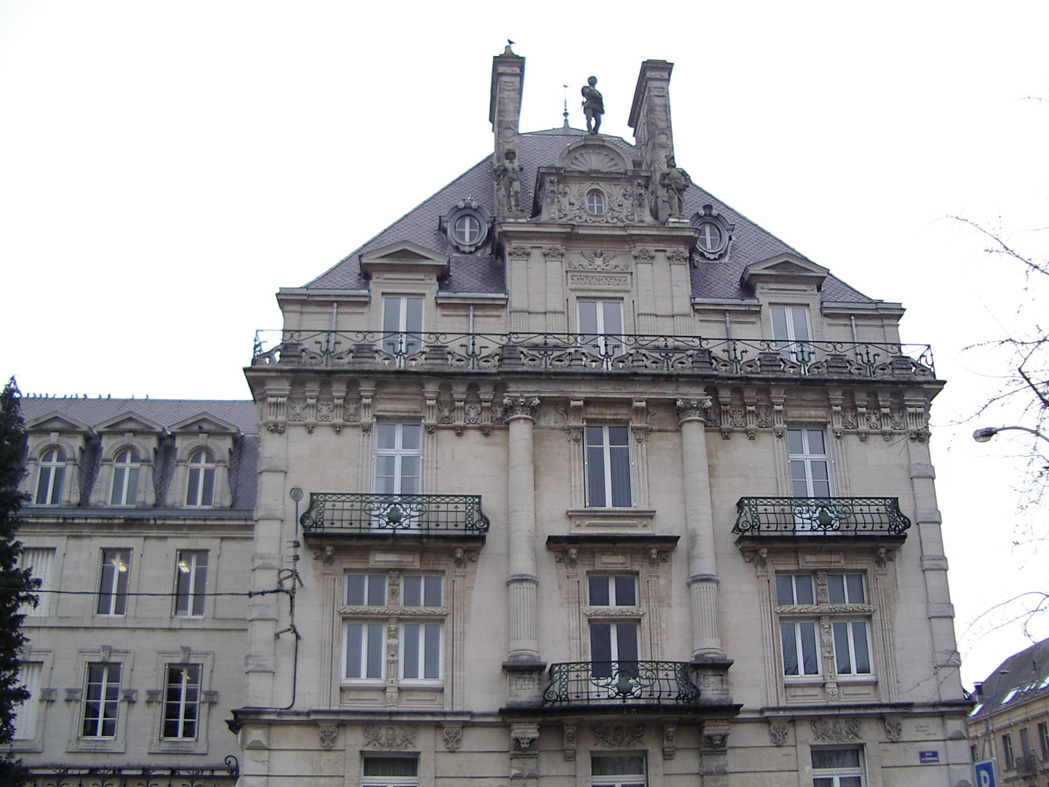 Façade maison à Mézières .